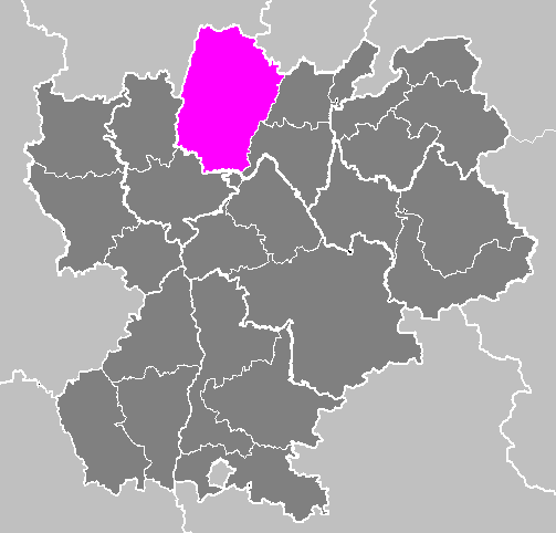 Maps of arrondissements and cantons of France: Arrondissement de Bourg-en-Bresse.PNG (Région Rhône-Alpes)